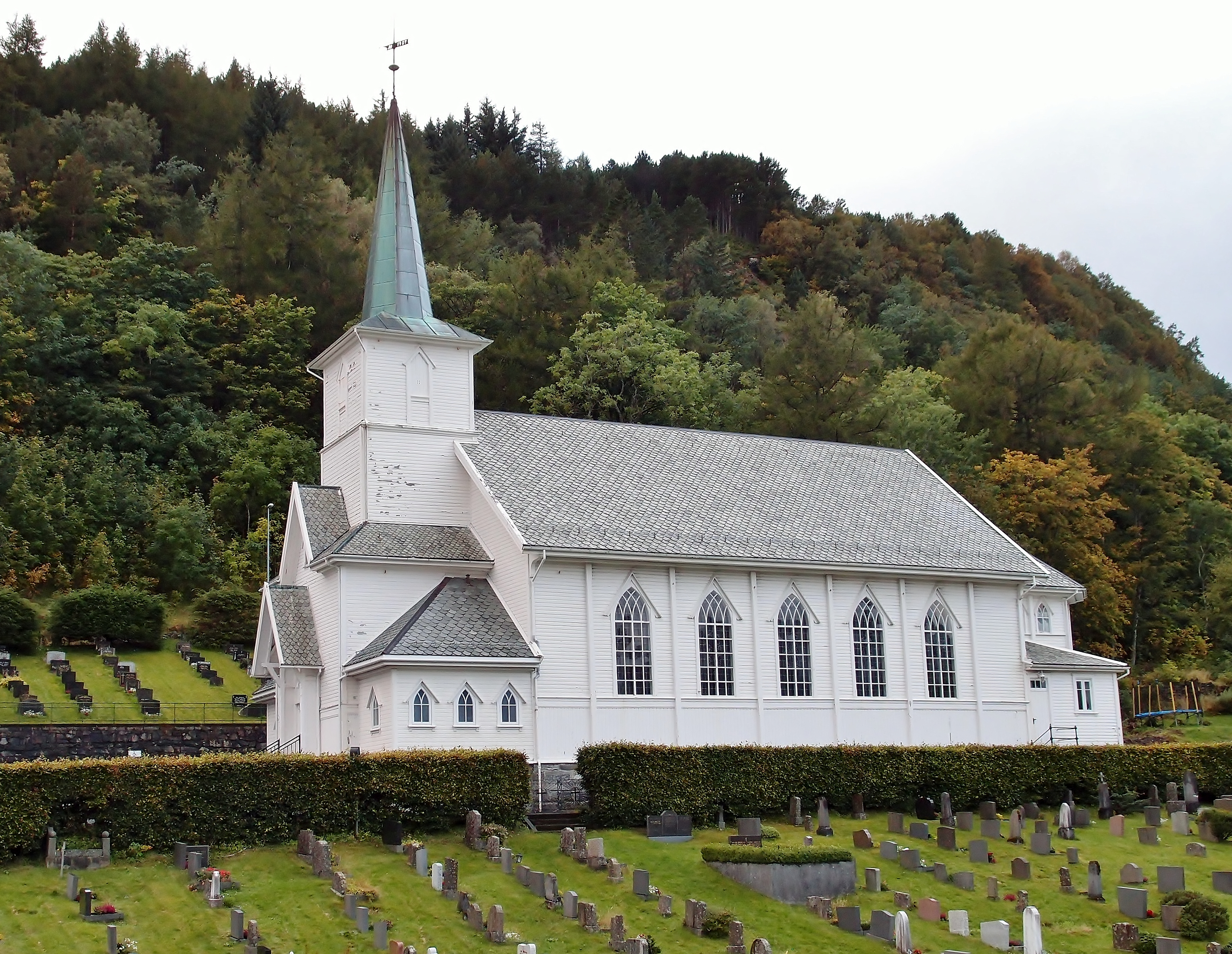 Sør Vågsøy kirke, Måløy i Vågsøy kommune, Sogn og Fjordane. Kyrkja stod ferdig i 1907.